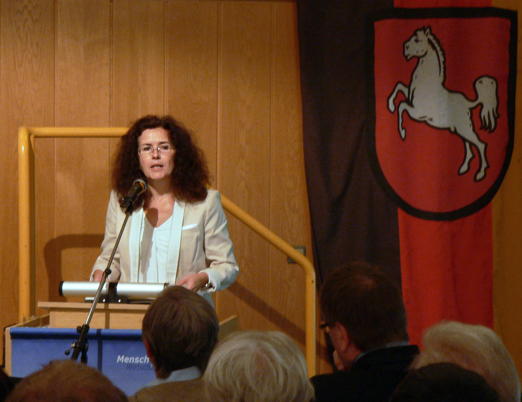 Gabriele Heinen-Kljajic bei der Eröffnungsveranstaltung zum Tag des Denkmals in Niedersachsen in Hameln